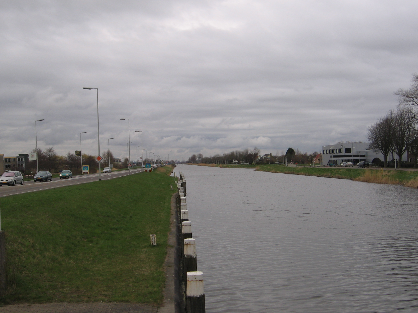 Hellevoetsluis